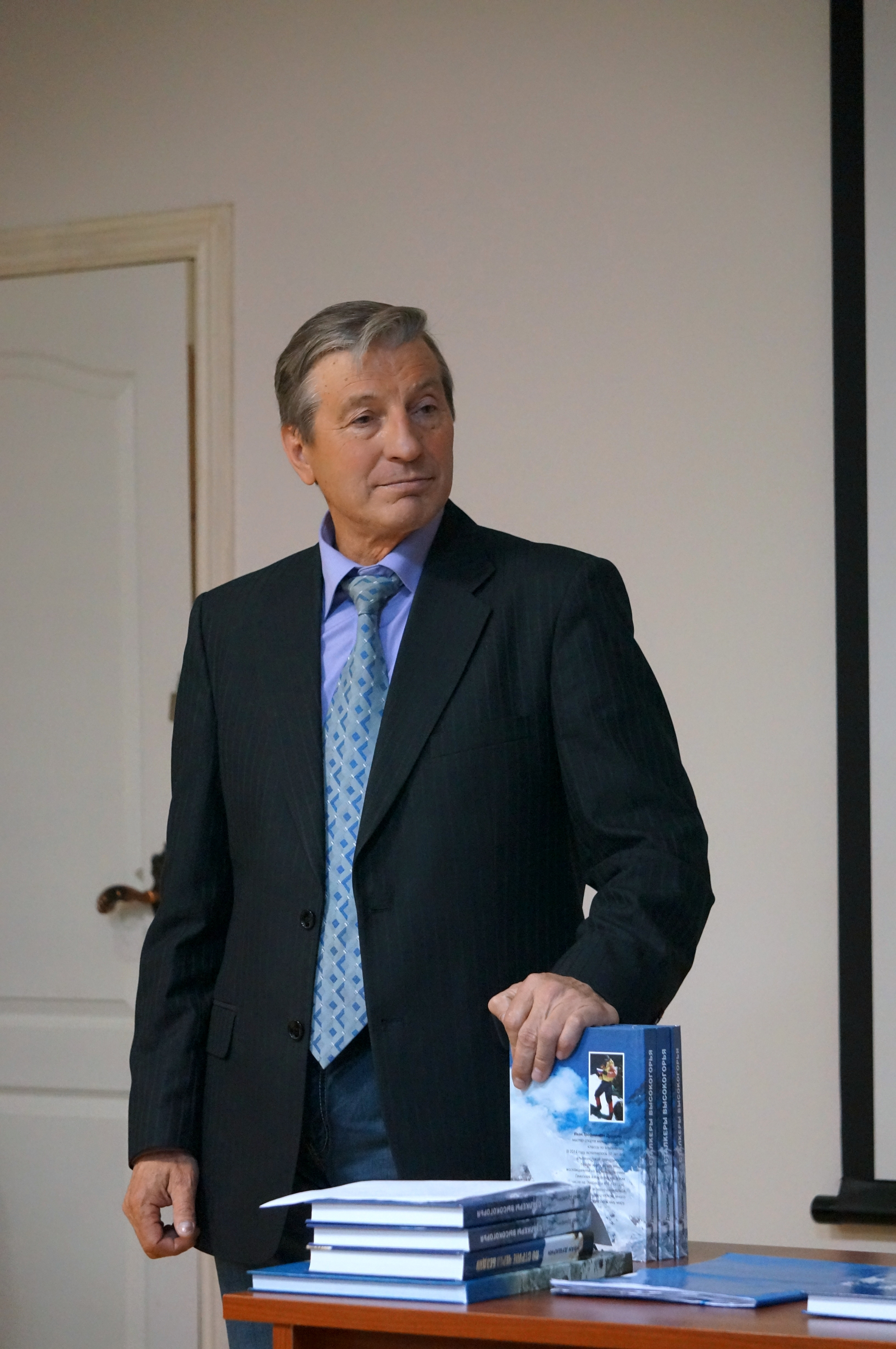 Иван Трофимович Душарин, советский и российский альпинист, вице-президент федерации альпинизма России. Презентация новой книги "Сталкеры поднебесья", Тольятти, 2014